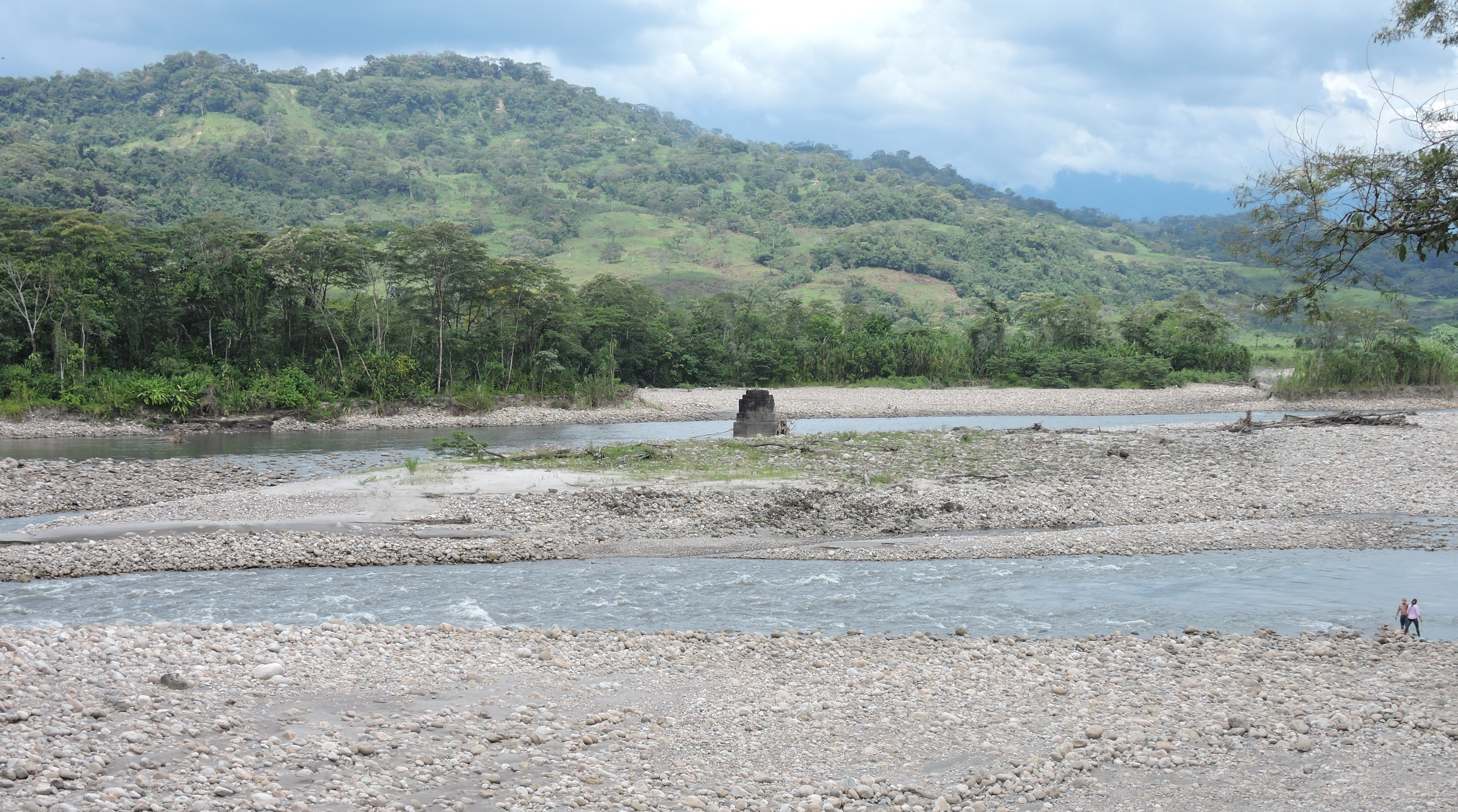 Río en Barranca de Upia Esta fotografía fue tomada en el municipio colombiano con código 50110.